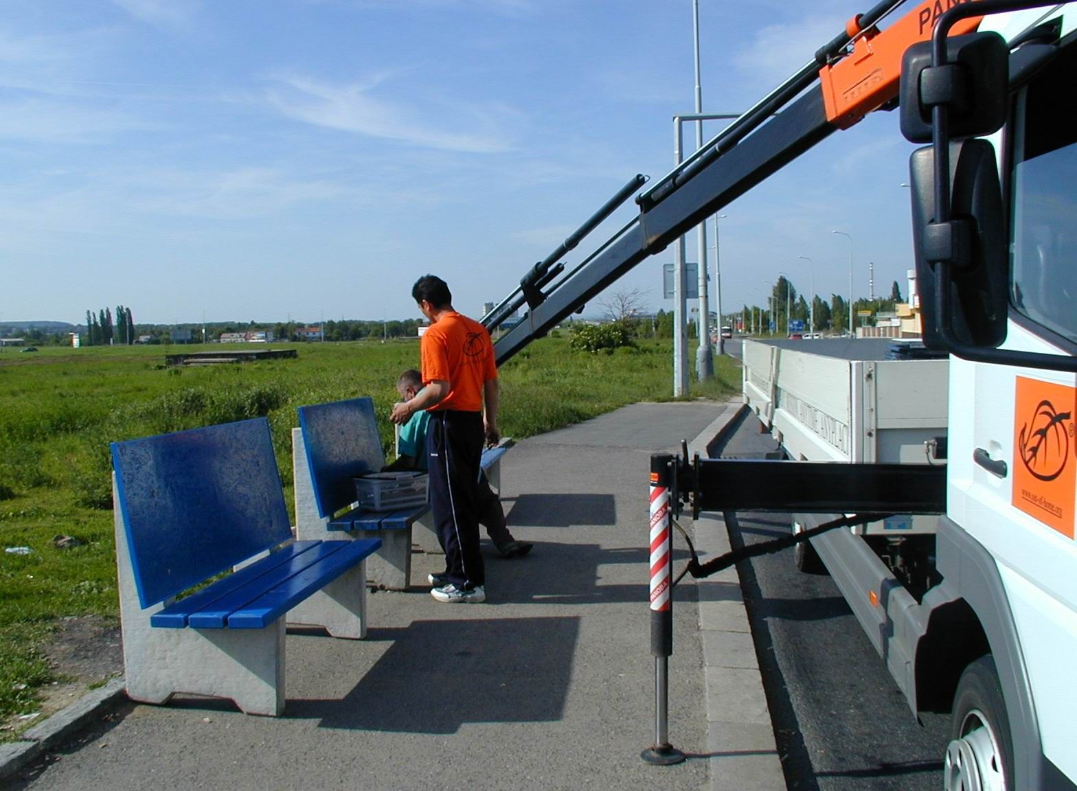 Společnost AD-Net umisťuje do ulic nové lavičky.